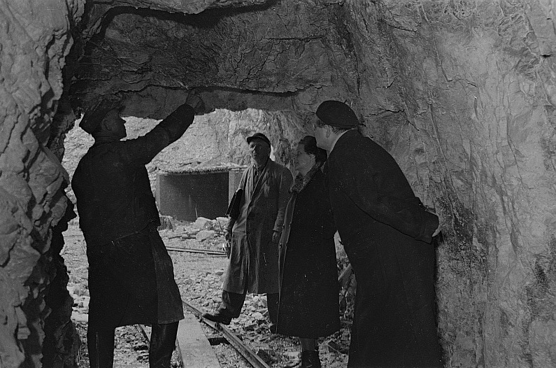 Original image description from the Deutsche Fotothek Ortsbesichtigung im Kalkwerk, dessen Abbaukammern der 2. Sohle 1945 Auslagerungsort für einen Teilbestand der Dresdner Gemäldegalerie waren. Hinter einem Stollnmundloch zeigt ein Sprengmeister vorbereitete Sprenglöcher